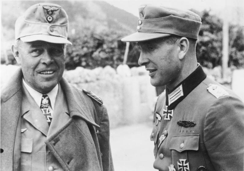 Generalfeldmarschall Kesselring, unter dessen bewährter Führung unsere in Italien kämpfenden Truppen seit Wochen dem mit großer zahlenmäßiger Überlegenheit immer wieder anstürmenden Feind erfolgreich Widerstand leisten und seine fast täglich wiederholten Durchbrüche vereiteln. UBz den Generalfeldmarschall mit Ritterkreuzträger Oberst Hippel, Kommandeur eines Grenadierregiments. [Text Scherlverlag; Herausgabe 8.9.1944]